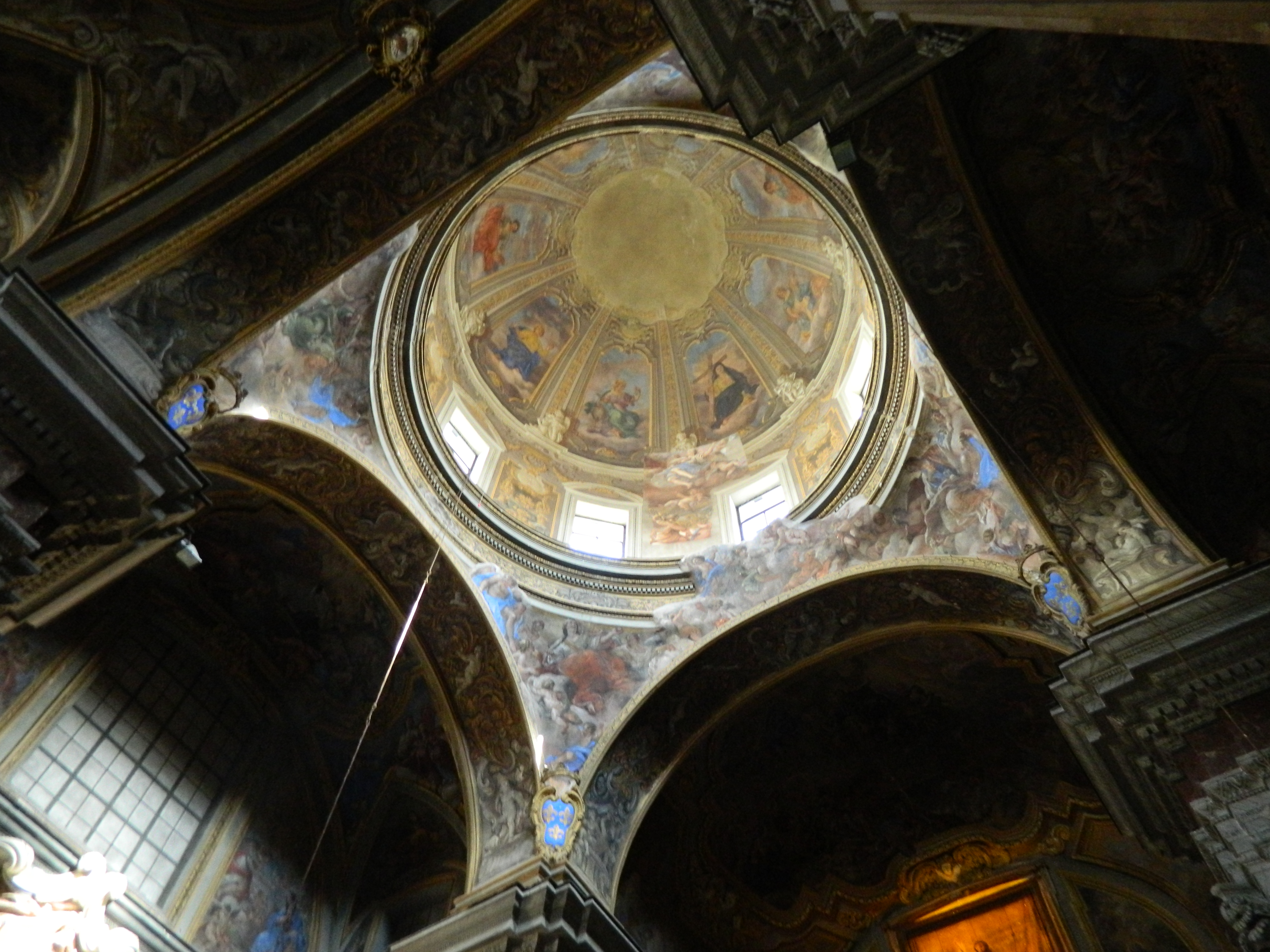 Chiesa di San Ferdinando (Napoli) - Cupola id Paolo de Matteis